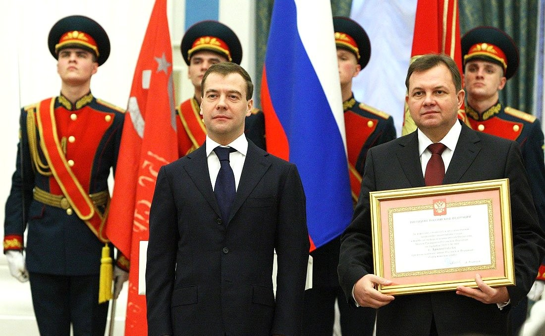 На церемонии вручения грамоты о присвоении звания «Город воинской славы» Архангельску. Дмитрий Медведев и мэр Архангельска Виктор Павленко